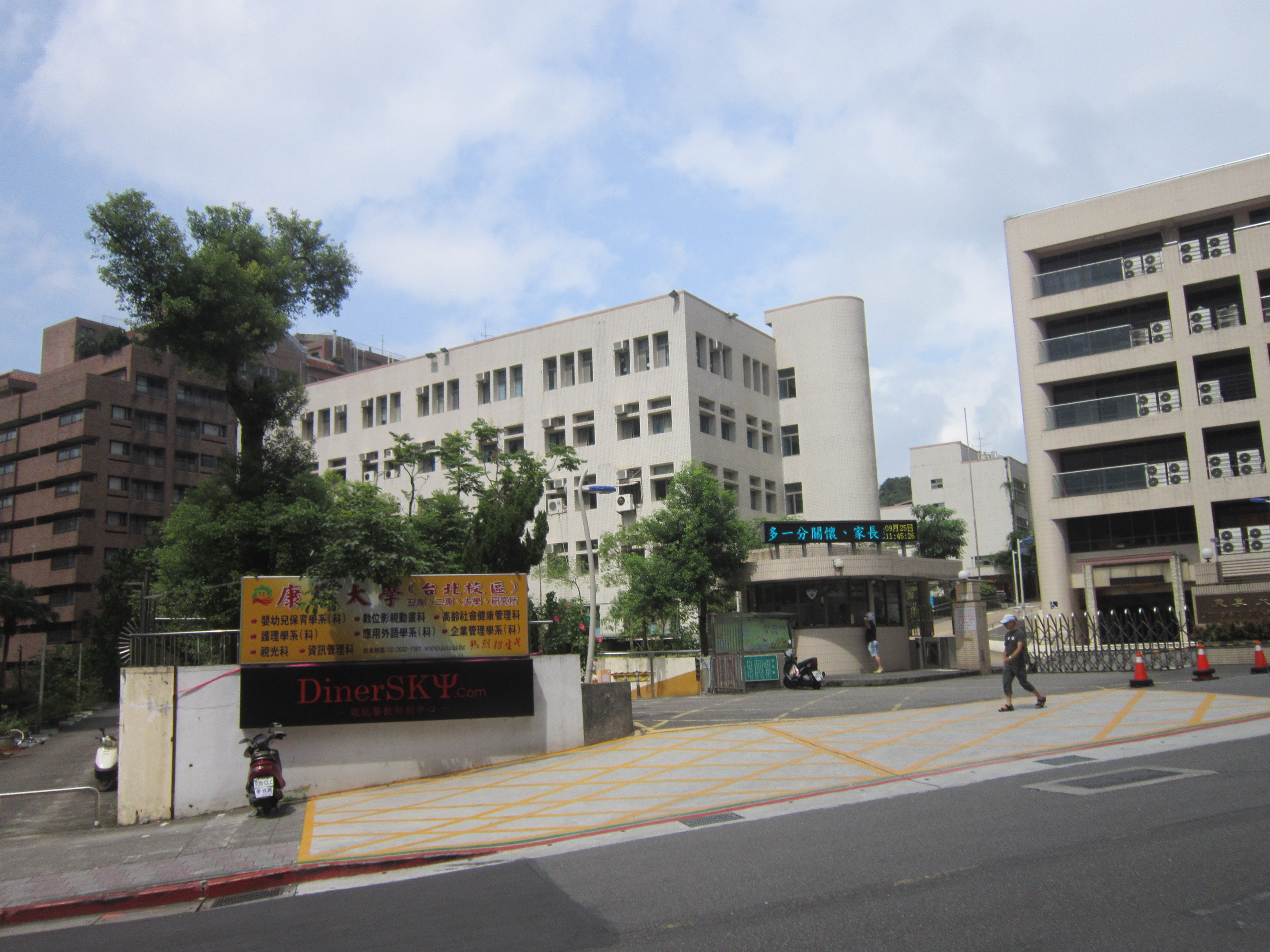 康寧大學台北校區